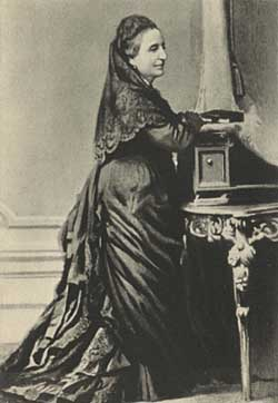 Giuseppina Strepponi (1815–1897), italienische Opernsängerin und zweite Ehefrau von Giuseppe Verdi.